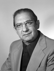 politico italiano